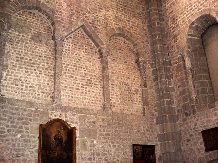 Mur intérieur roman de l'ancienne abbaye d'Aurillac. Vers 1040. Un des murs du transept orné d'un triplet à mitre de baies aveugles.